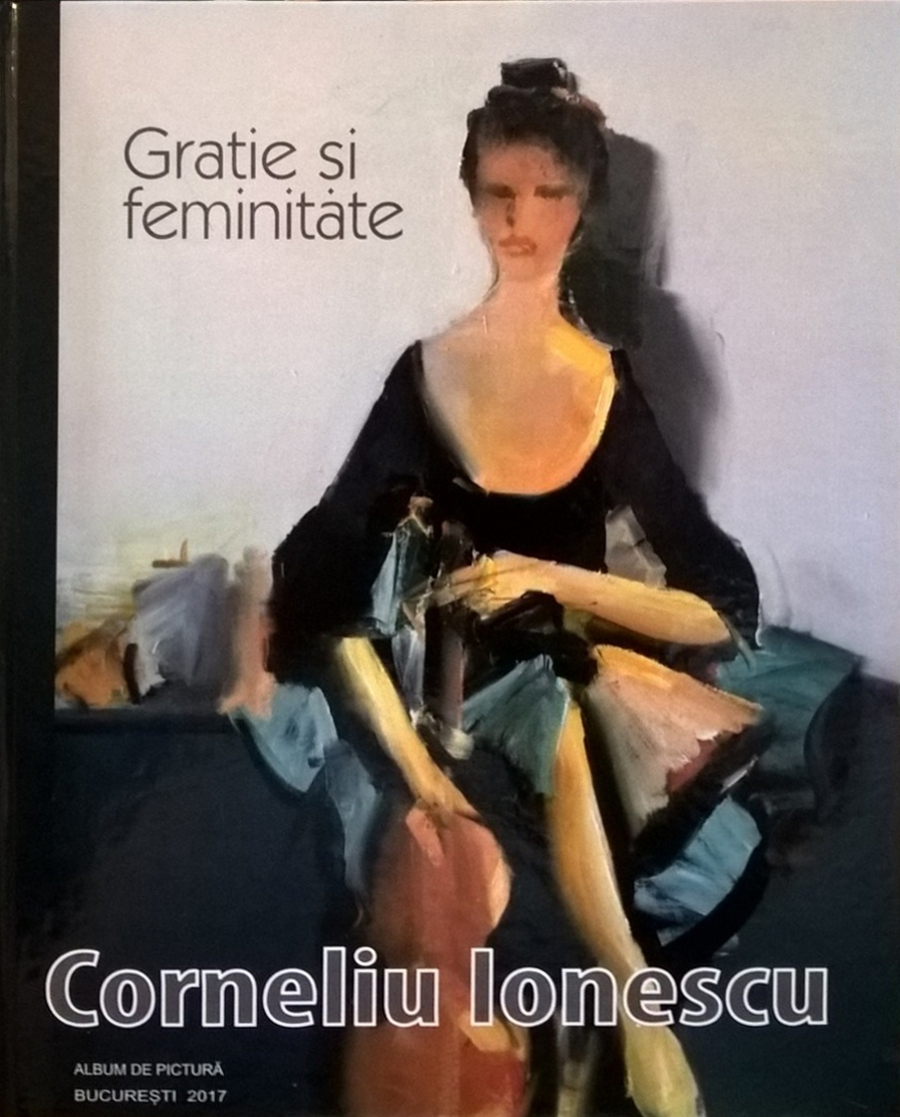 Grație și feminitate - Album de pictură biografic, București, 2017